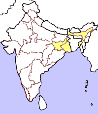 Kartorna bygger på resultat i senaste delstatsval (Juni 2004). Rött betyder att partiet deltar i delstatsregeringen, orange att partiet vann mandat i senaste delstatsvalet och gult att partiet hade lanserat kandidater men utan att vinna mandat. Kartorna tar inte hänsyn till avhopp, partifusioner och fyllnadsval under den ordinarie mandatperiodens gång.